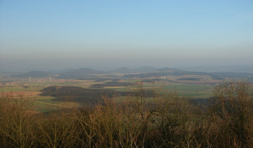 Das hessische Kegelspiel in der Kuppenrhön, fotografiert vom Stoppelsberg aus.